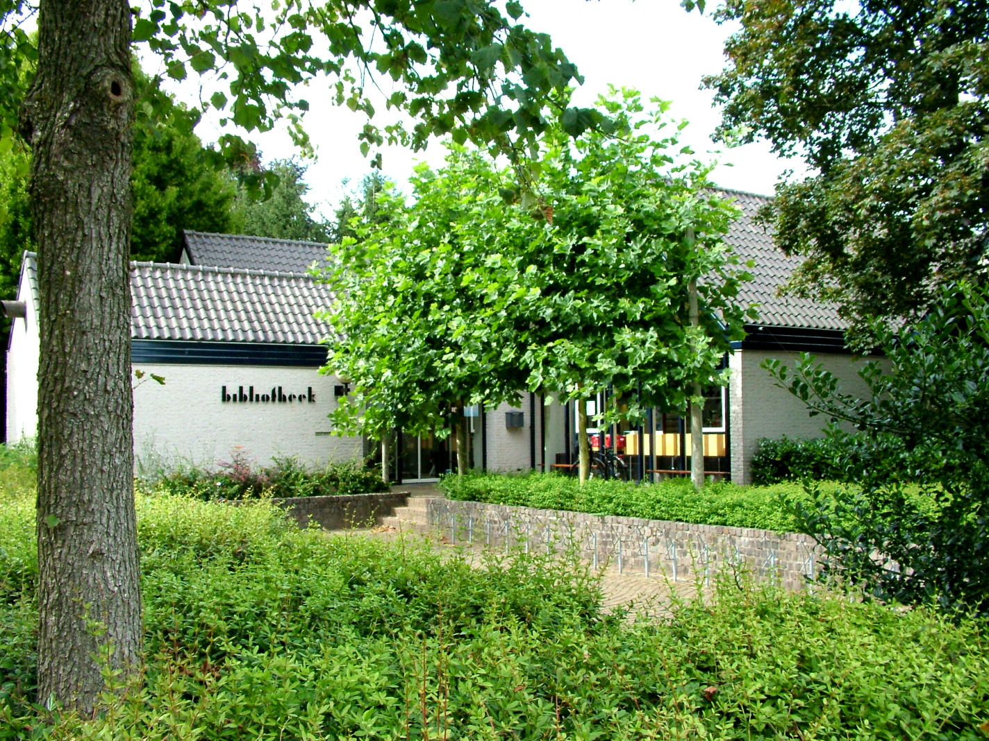 Achterhoekse Poort: Bibliotheek Terborg.